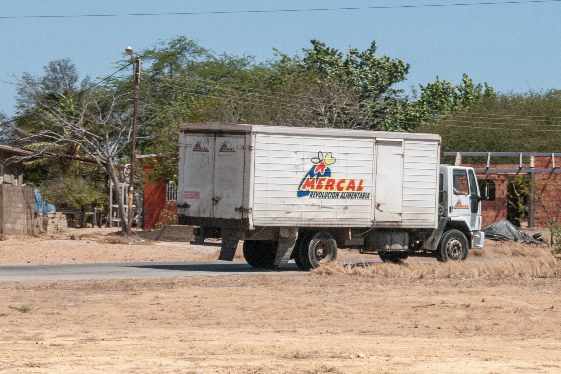 Camión de Mercal en Isla Margarita